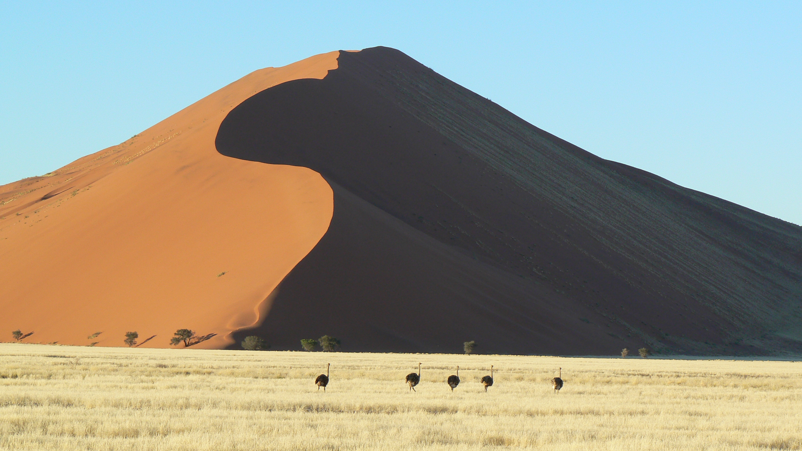 Dune de Namibie, au premier plan, des autruches